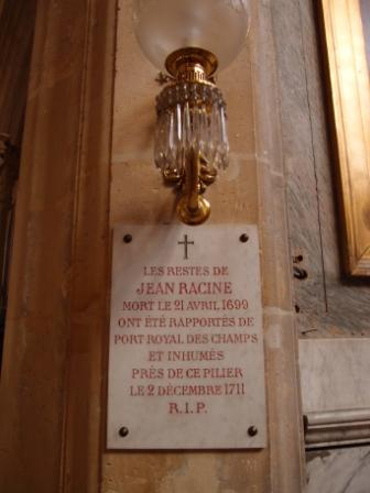 Erinnerungstafel für den französischen Dramatiker Jean Baptiste Racine (* 21. Dezember 1639 in La Ferté-Milon; † 21. April 1699 in Paris) in der Église Saint Etienne-Du-Mont (Rue de la Montagne Sainte-Genevieve), Paris.